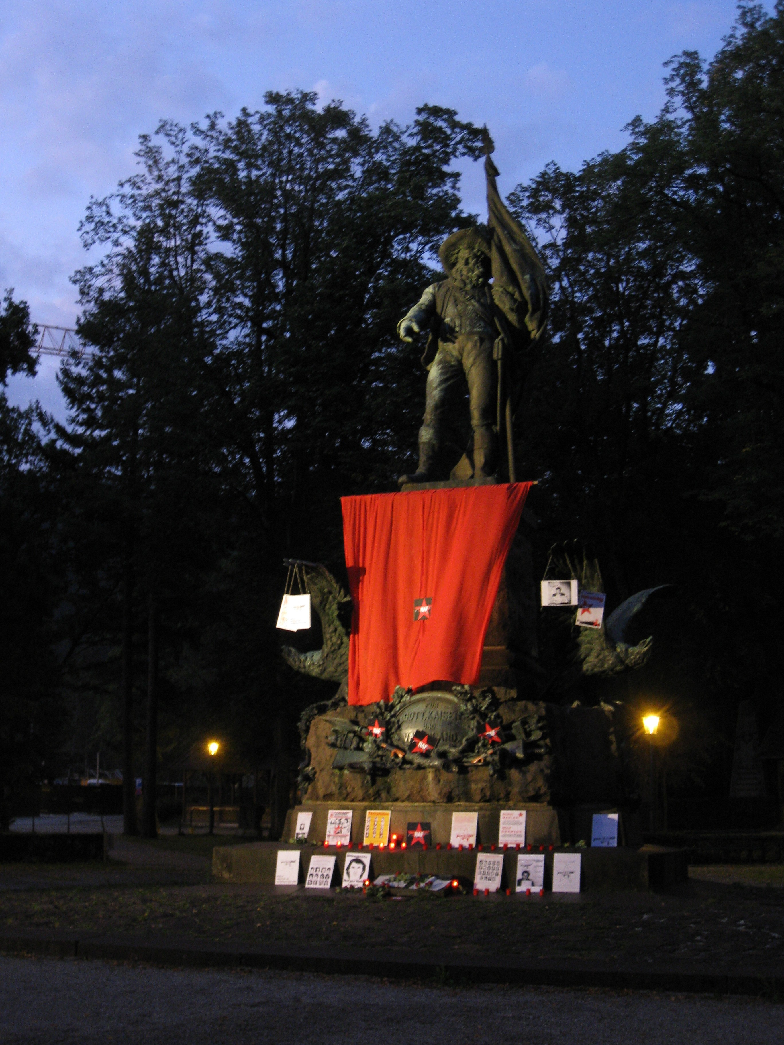 Umgestaltetes Andreas-Hofer-Denkmal in Innsbruck, August 2009